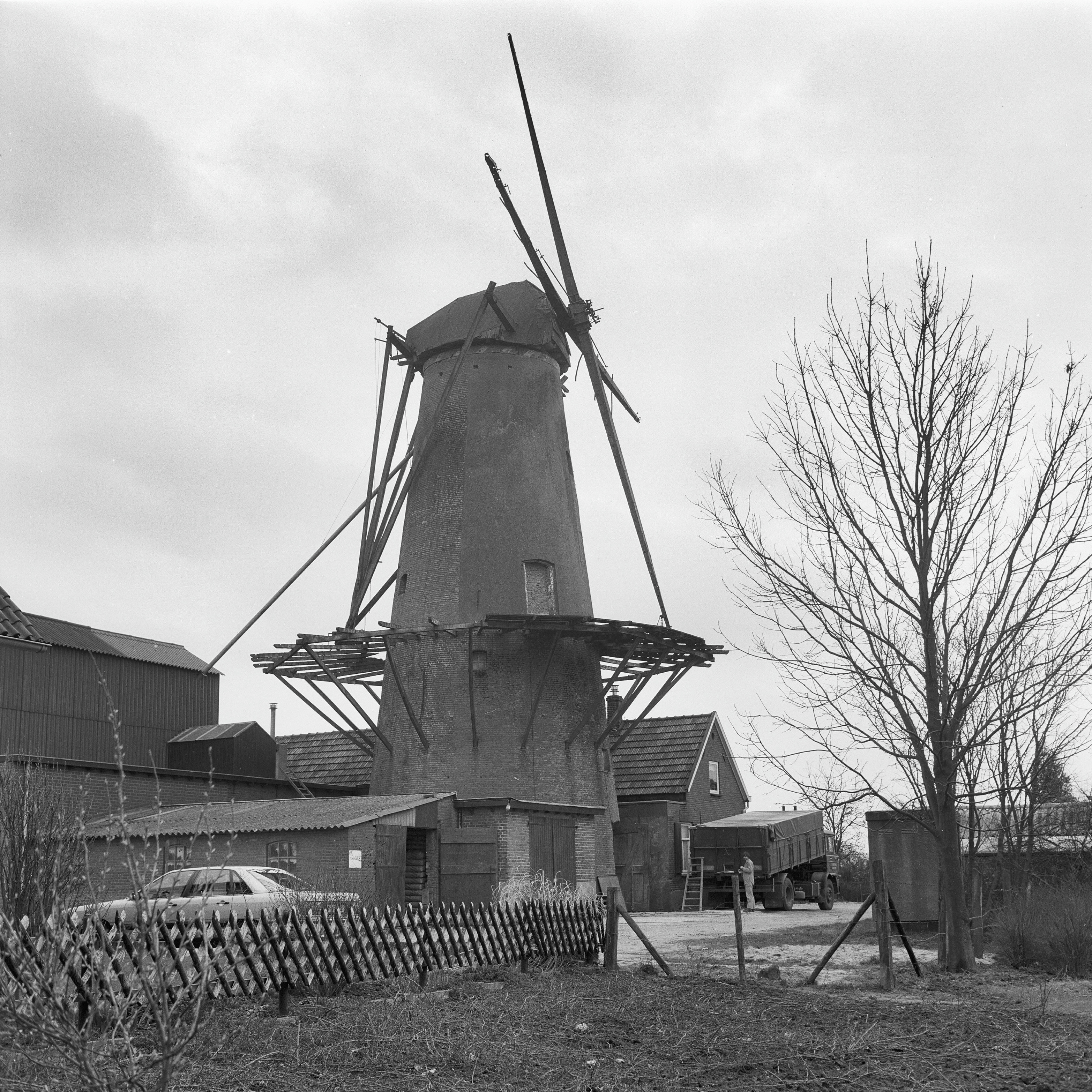 Diversen: korenmolen "De Welvaart", exterieur